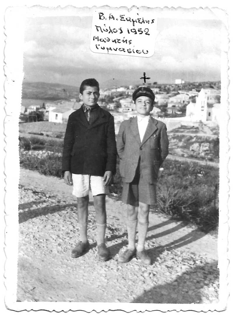 1952: Αγόρια κάτω των 16 ετών δεν φορούσαν μακρύ παντελόνι